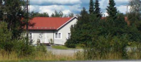 Blekkhuset på Lierfoss i Aurskog-Høland kommune.